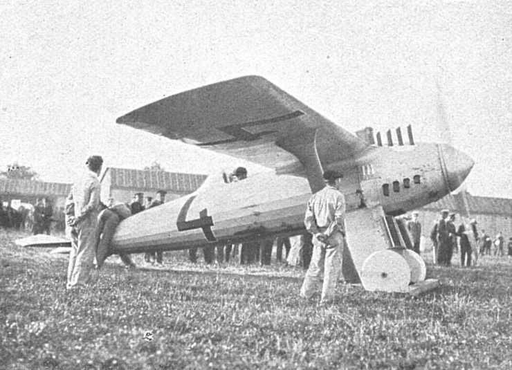 Letov Š-8 (1924)